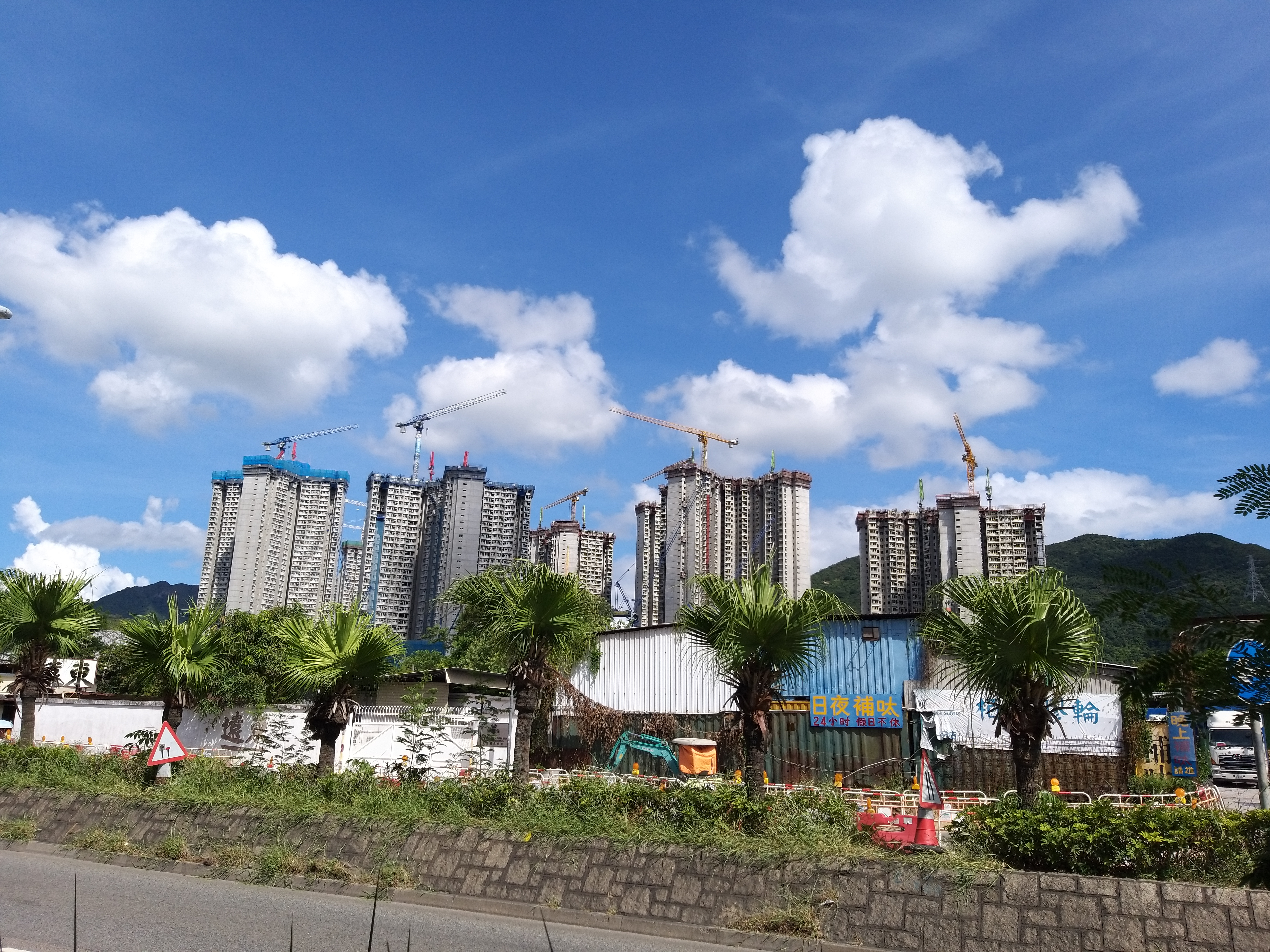 鄉郊裡的孤島